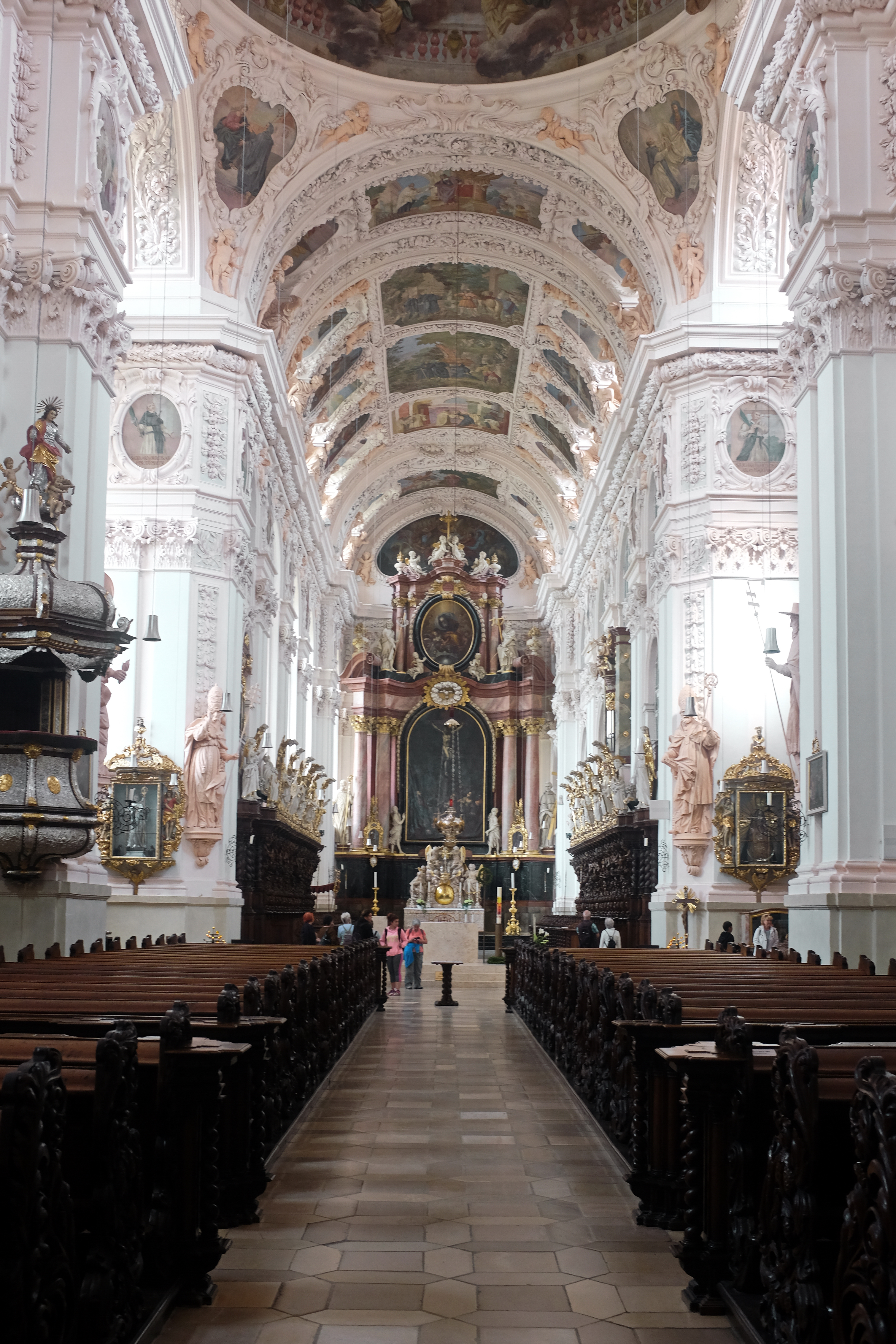 Klášter Waldsassen, Bavorsko